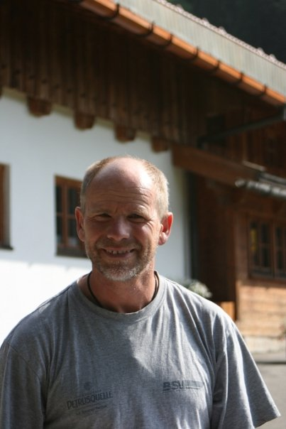 See Title